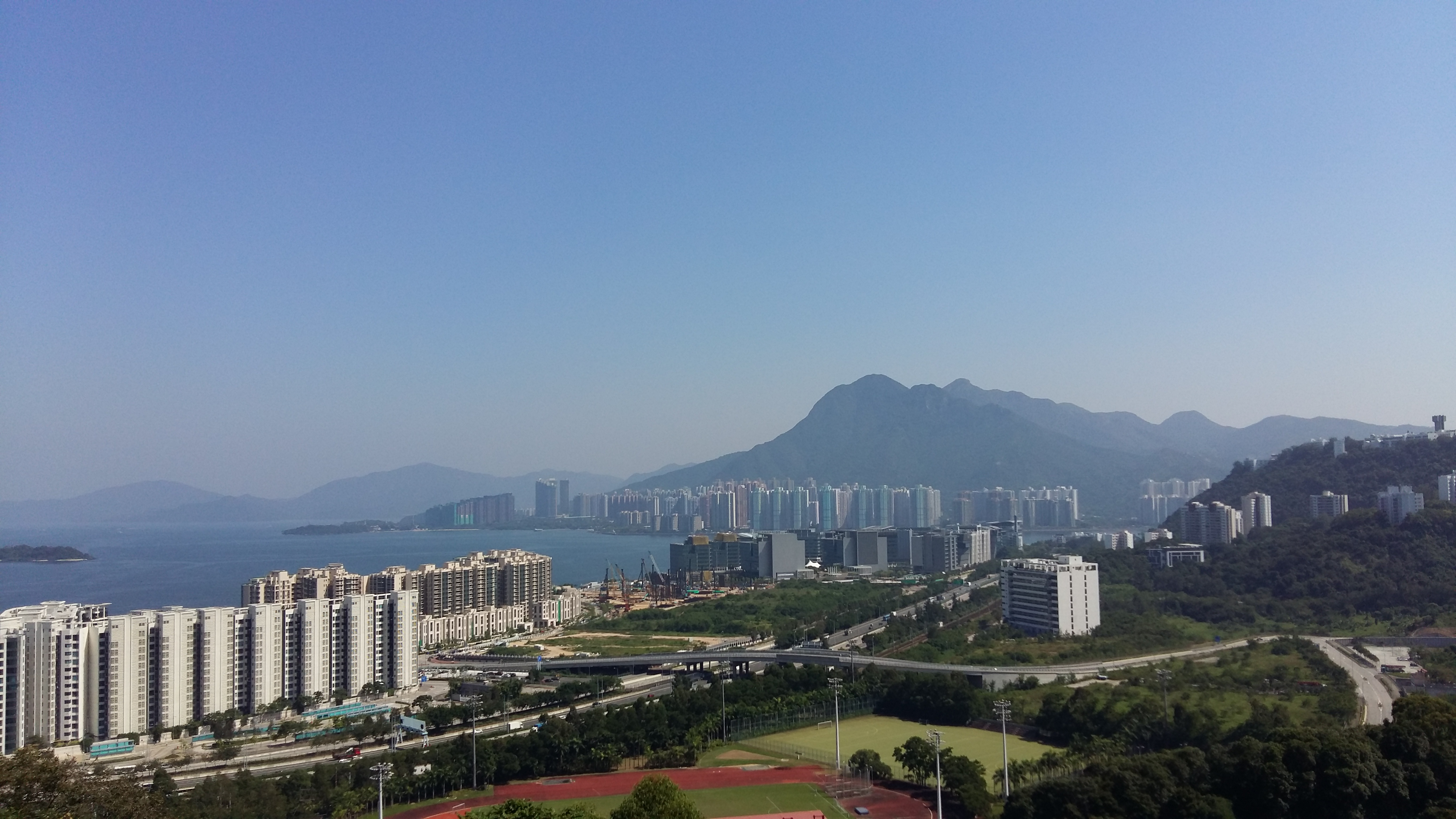 粵語: 孫方中書院向南遠望景觀